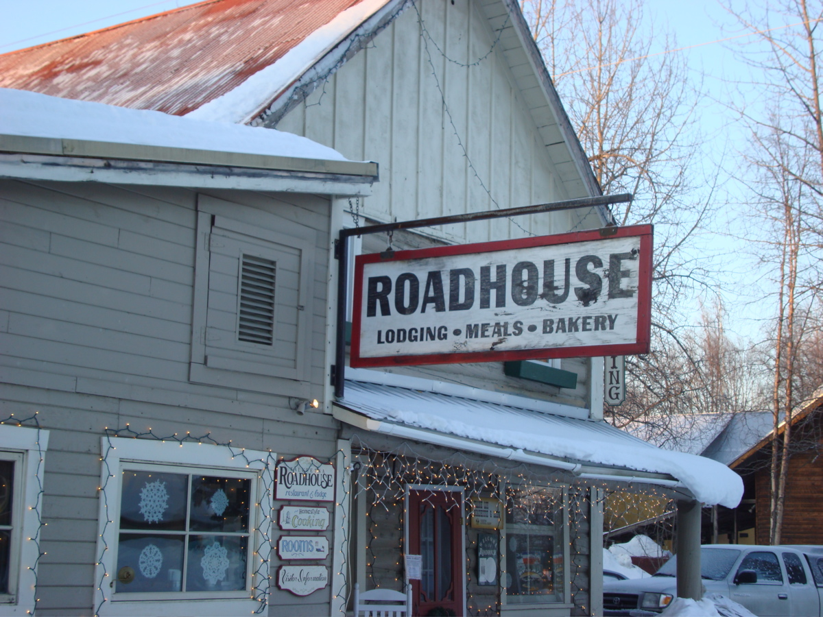 Talkeetna, AK